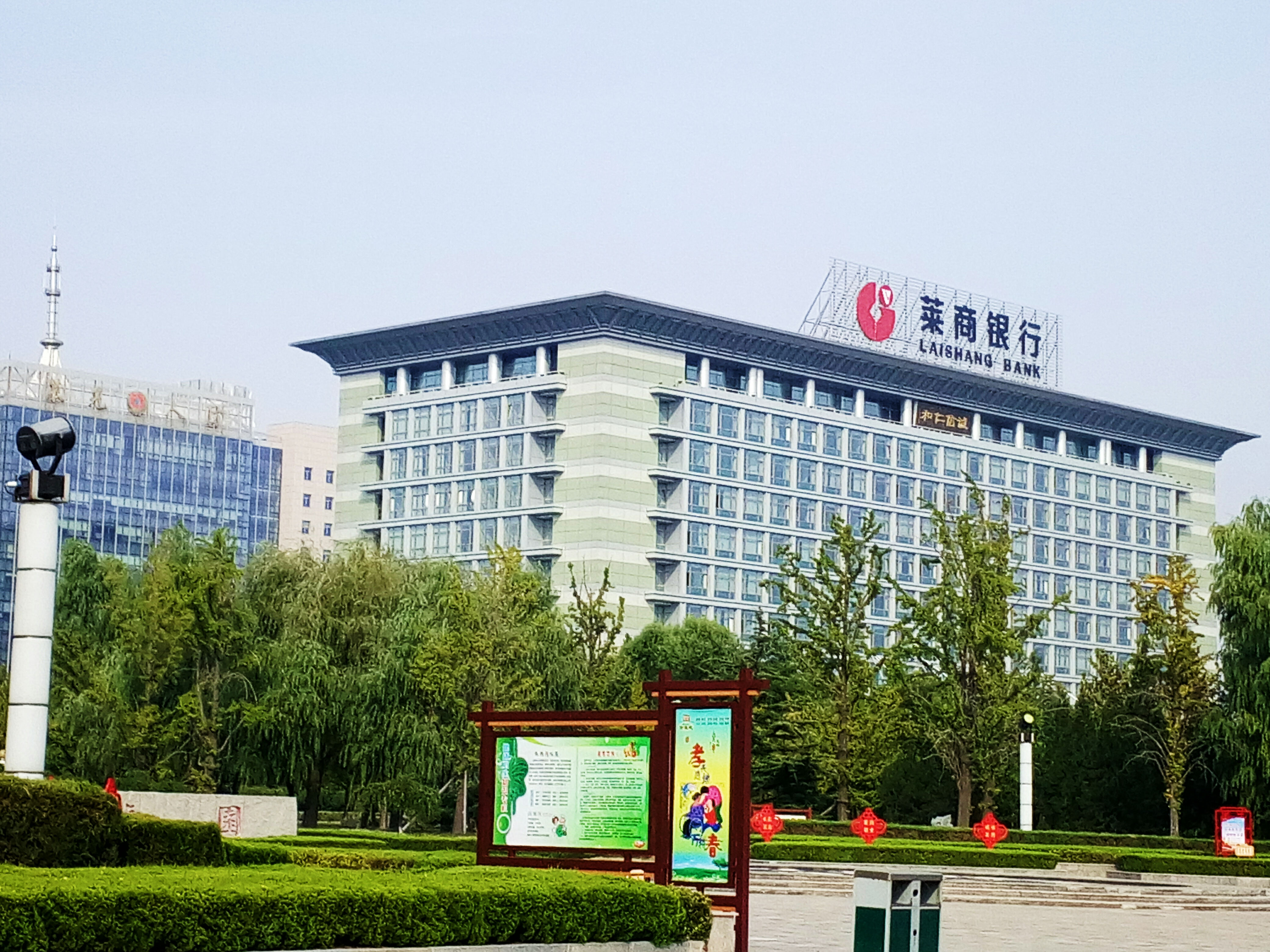 莱商银行总部大厦